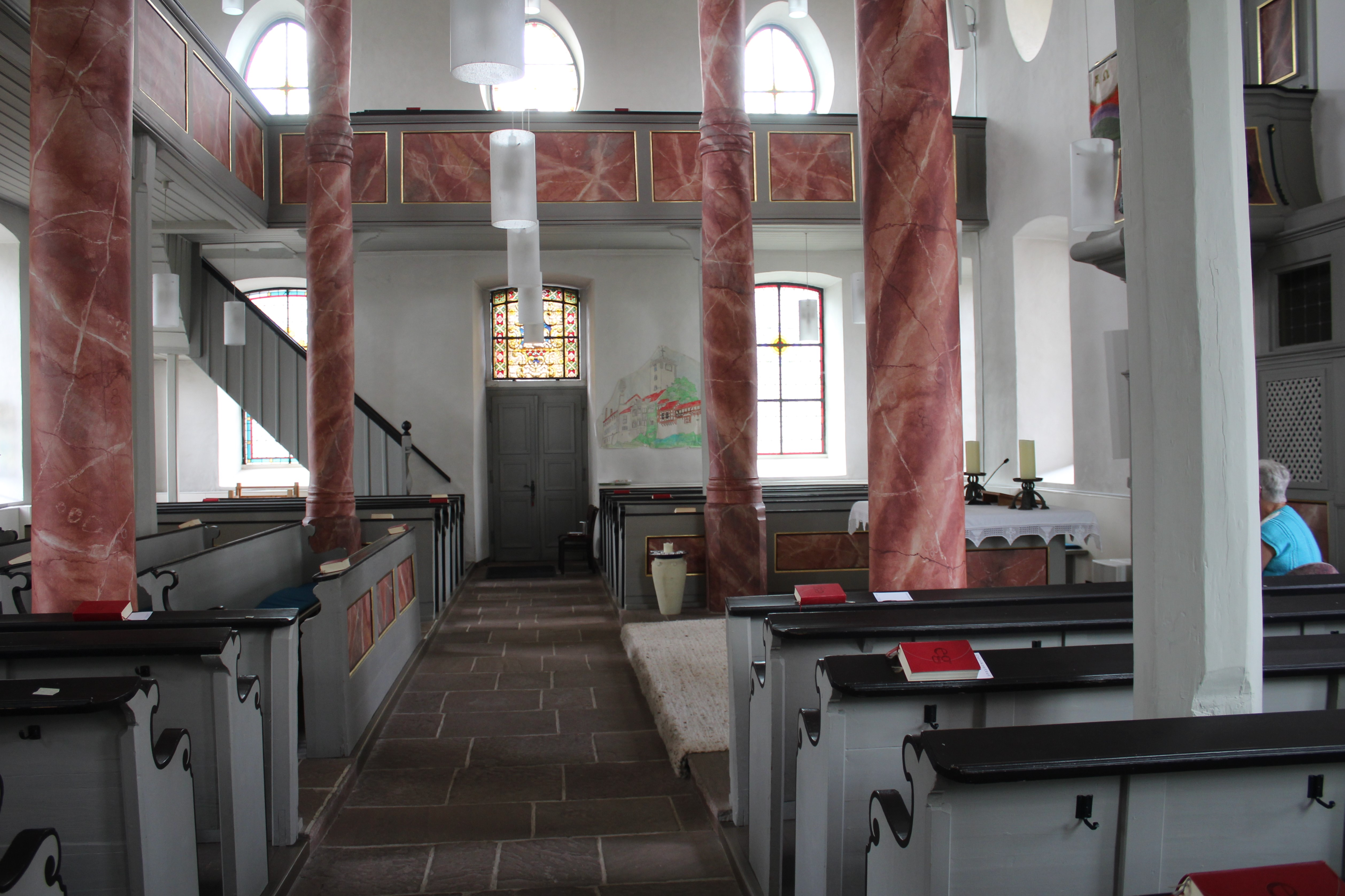 Ev. Kirche Schwalbach, Schöffengrund, Lahn-Dill-Kreis, Hessen, Deutschland